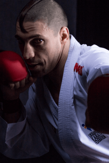 Український каратист